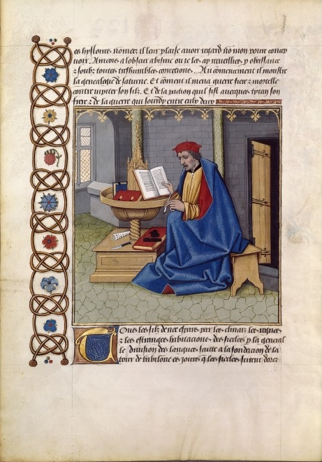 Raoul Lefèvre écrivant département Manuscrits occidentaux cote du document FRANCAIS 252 période du document XVIème siècle date du document ou du recueil 14..-15.. partie de Recueil des histoires de Troyes. - Cognac folio, pagination Folio 1v auteur(s) Testard, Robinet (Enlumineur) Le Fèvre, Raoul (14..-14..) (Auteu